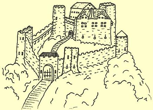 Teckning gjord av en tysk legoknekt, Paul Dolnstein 1502 vid belägringen av Örestens fästning